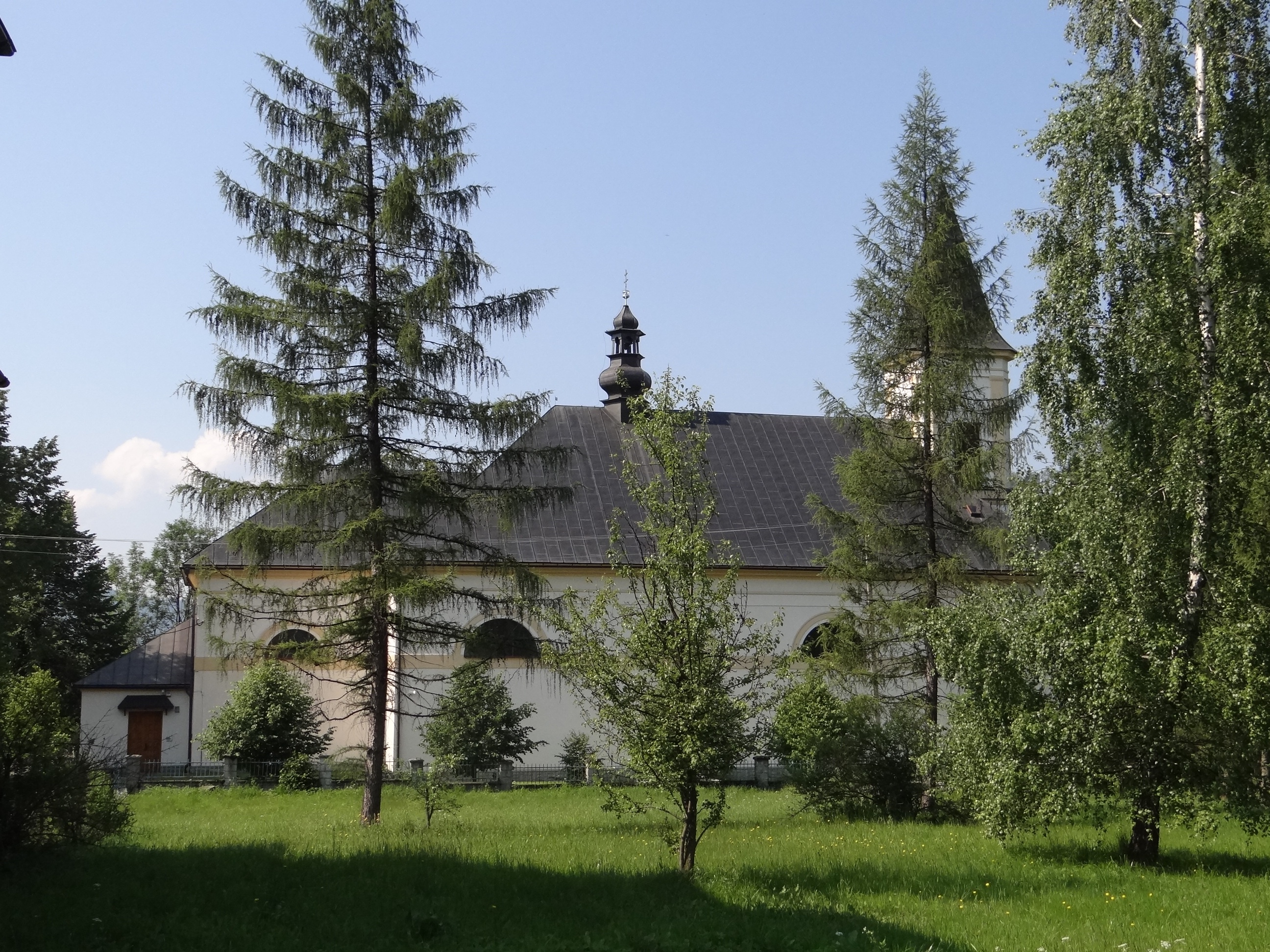 Kościół w Koszarawie